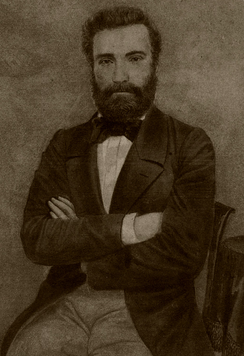 A.G. Golescu - prime minister of Romania